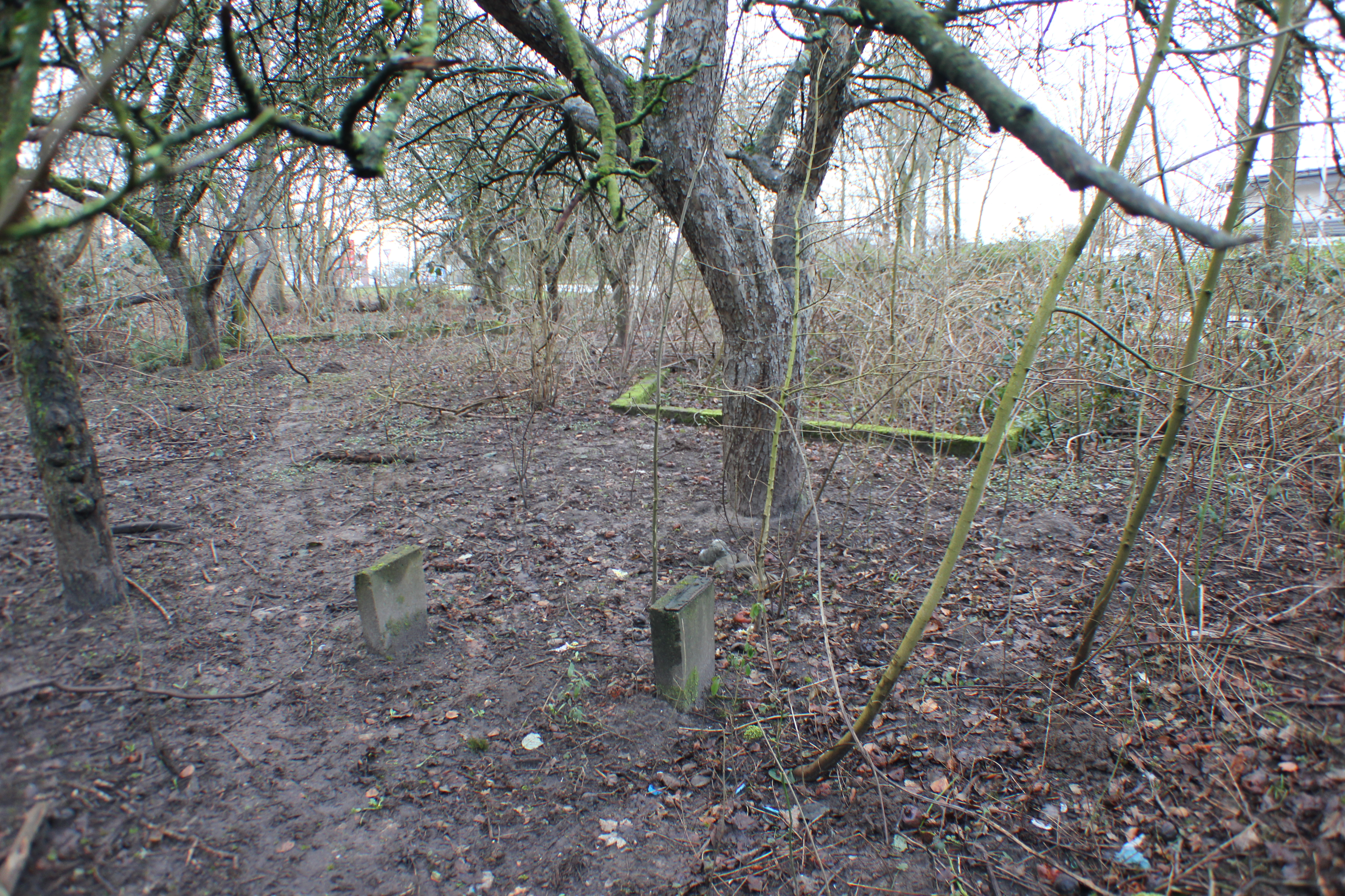 Hansi-Garten (Flensburg-Mürwik, 2014), Bild 001